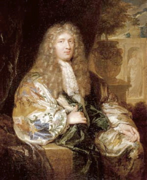 Gisbert Cuper in weelderige kleding en omringd door verwijzingen naar de oudheid